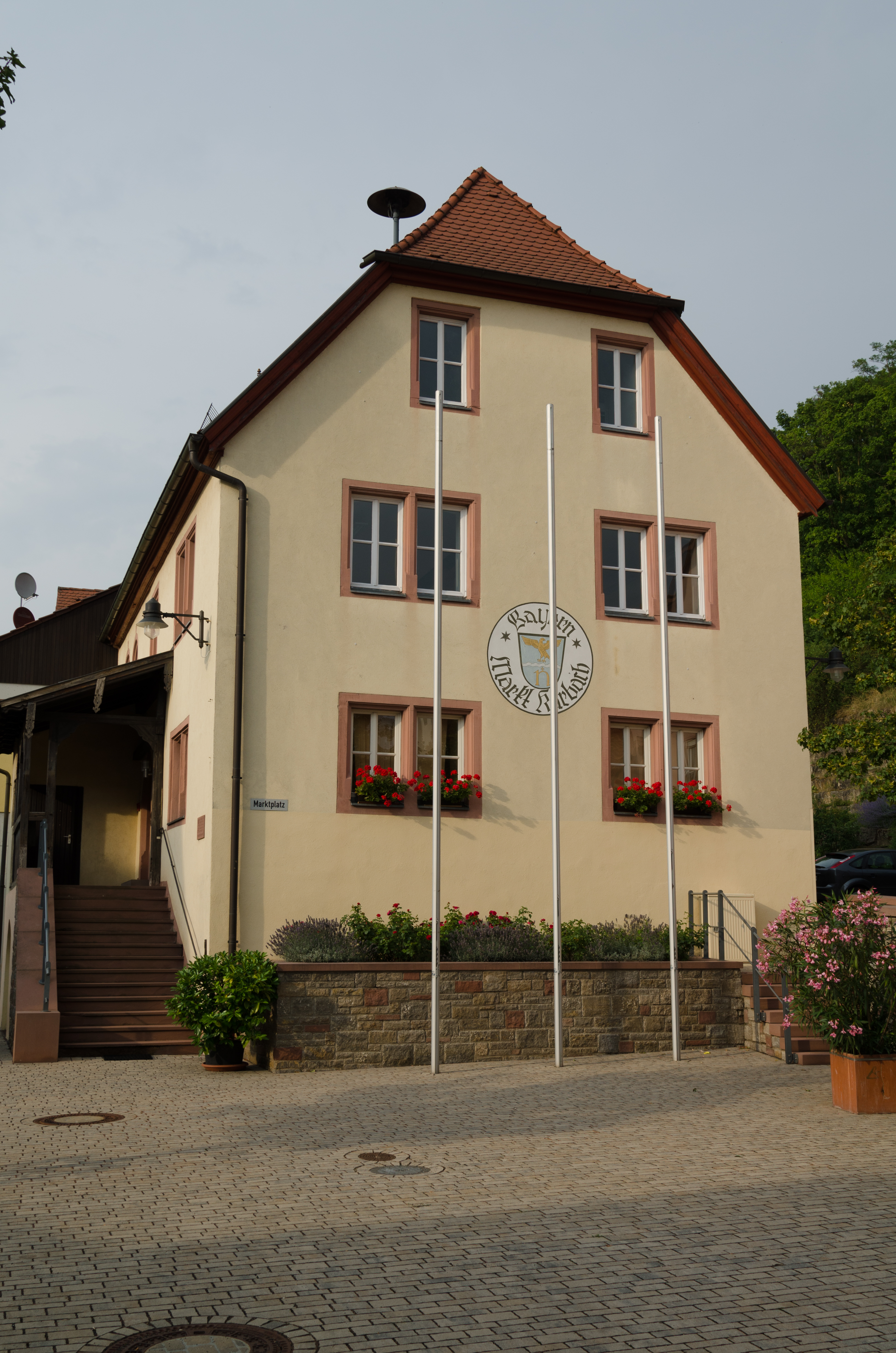 Karbach, Marktplatz 1